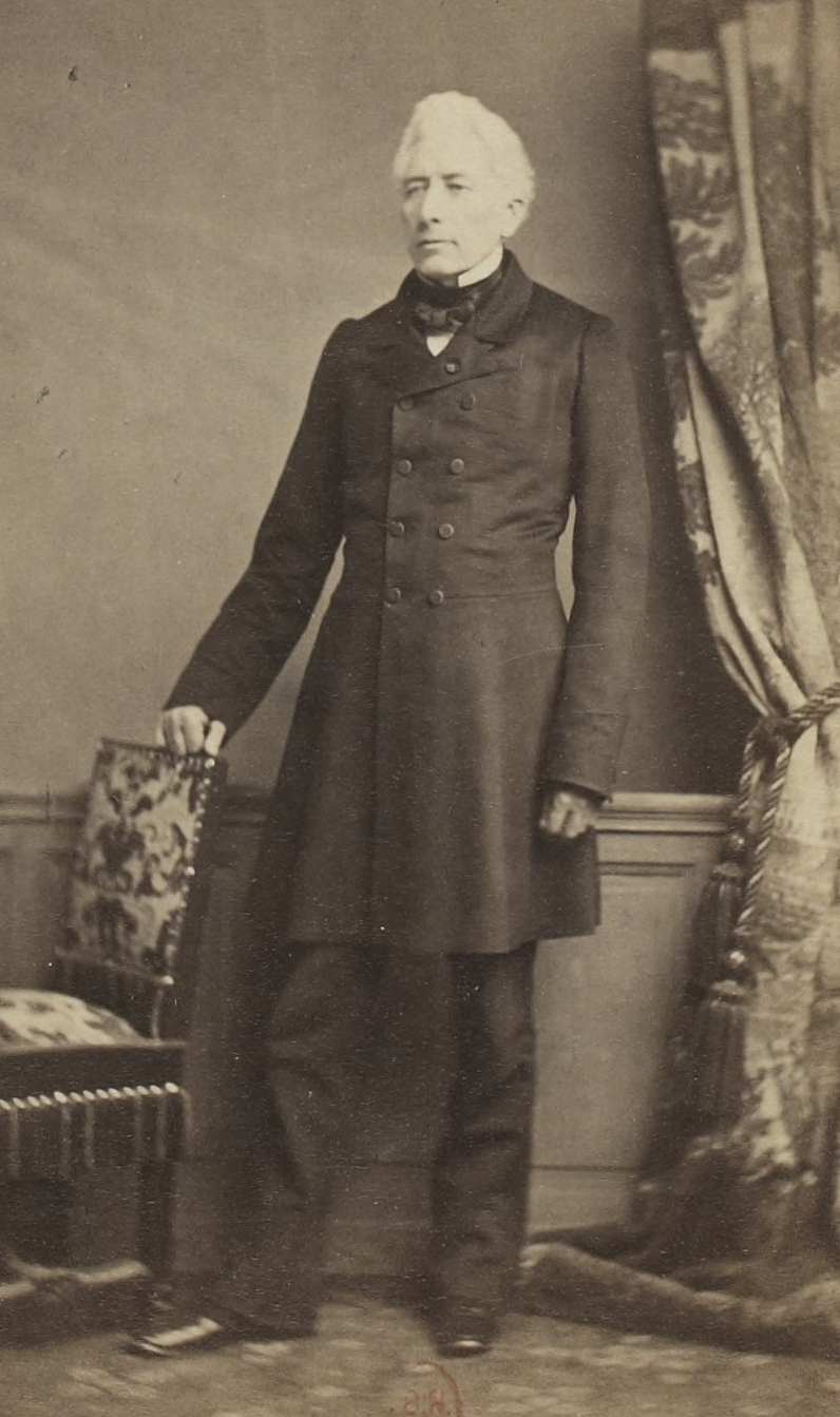 Album des députés au Corps législatif entre 1852-1857.